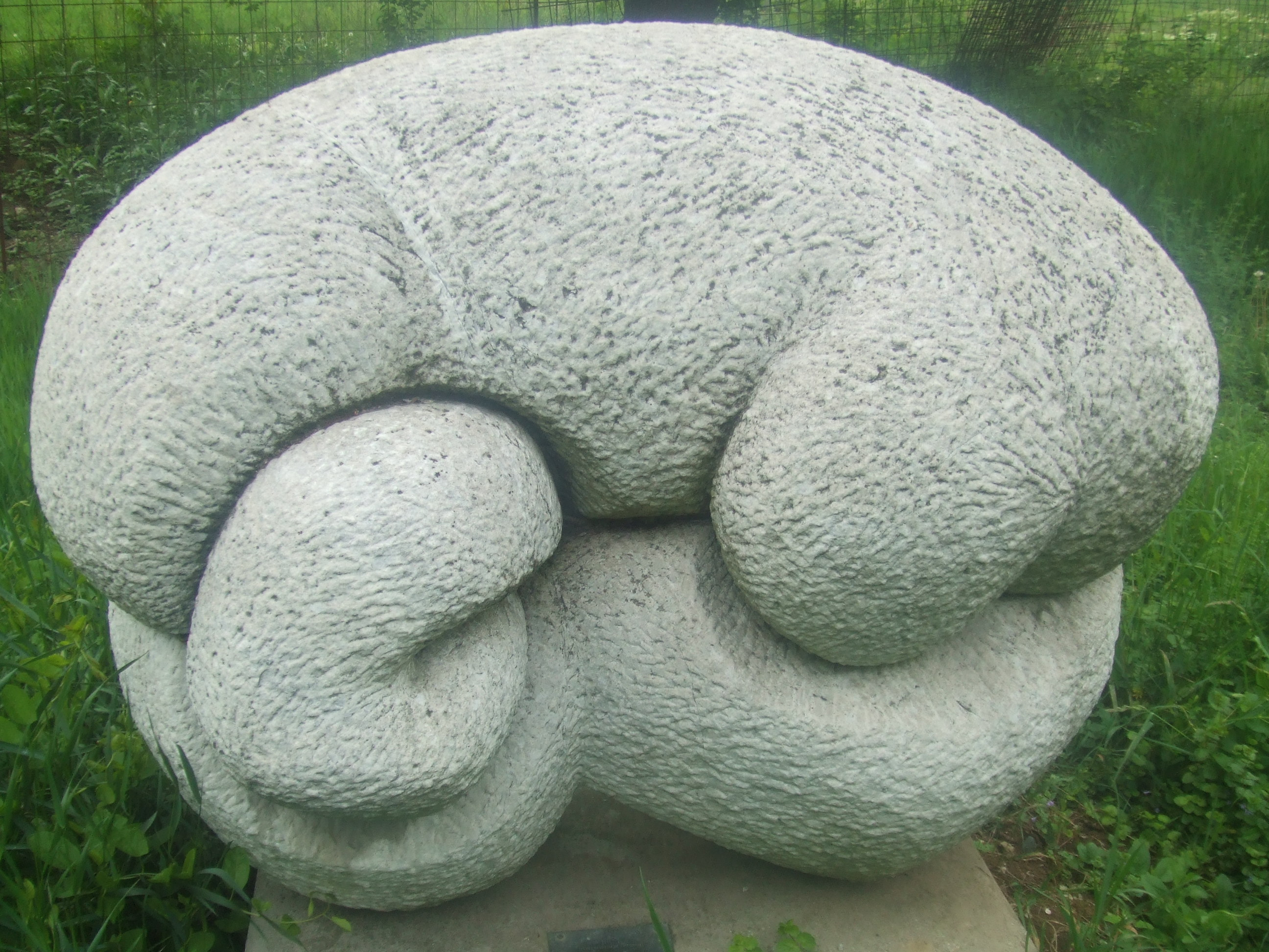 Олга Јанчић, Језгро облика II, 1969-1970